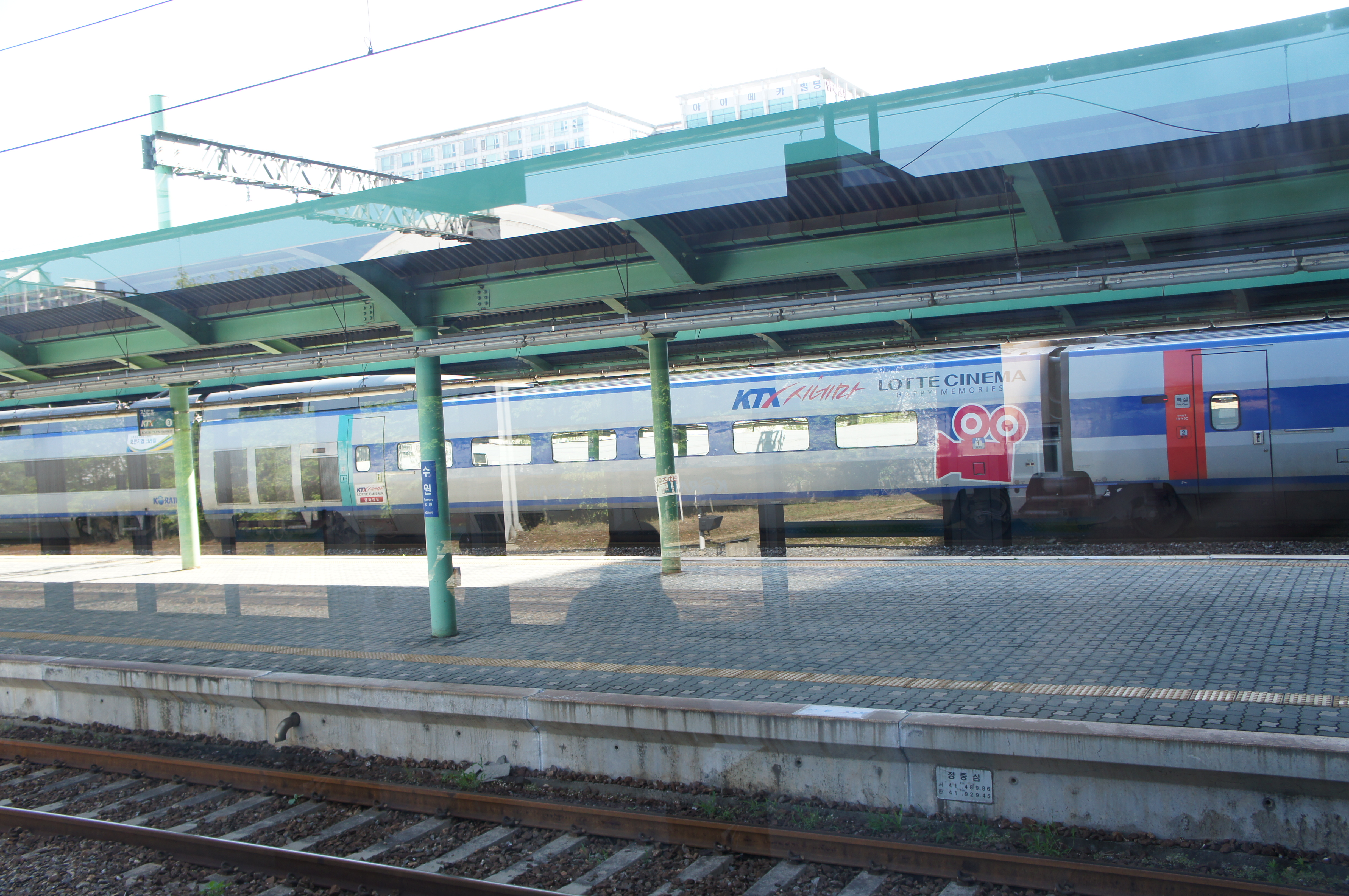 수원역 일반열차 승강장